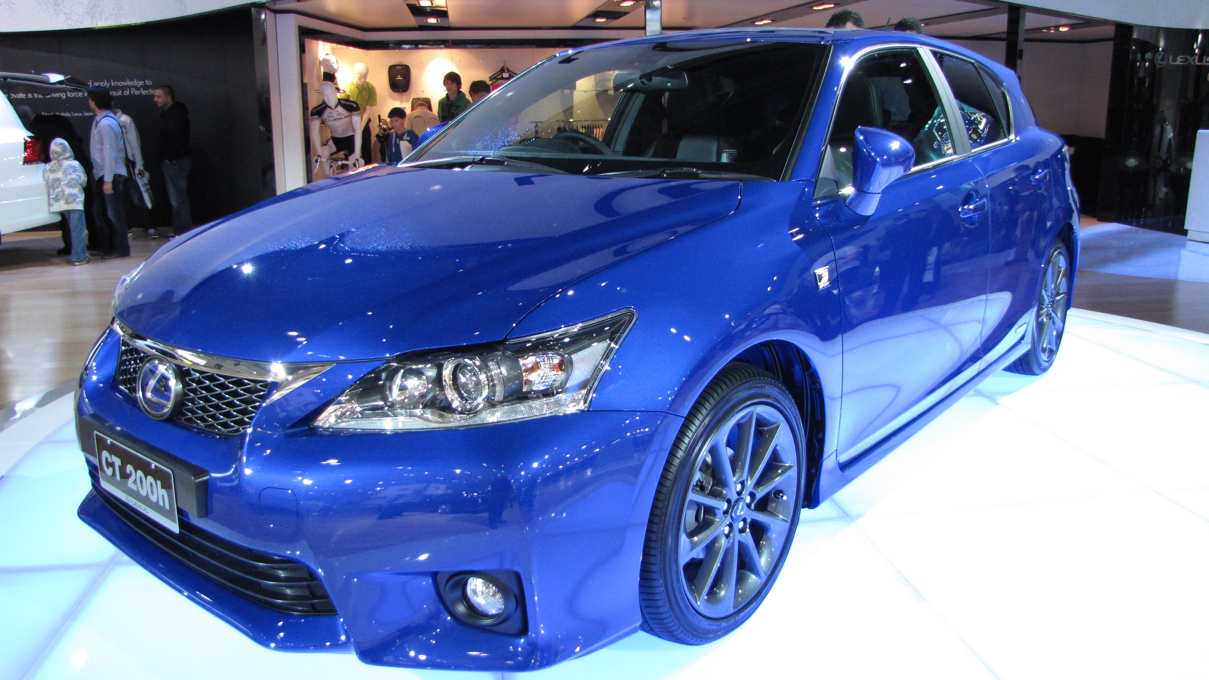 Lexus CT 200h